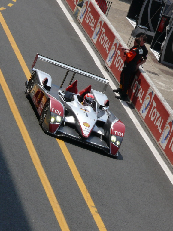 Audi R10 retour au stand pendant la journée test des 24H du Mans 2007